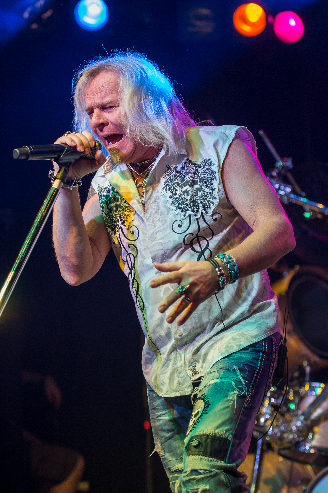 Bernie Shaw,Concertbüro Franken,Der Hirsch,Konzert,Livekonzert,Livemusik,Musik,Uriah Heep